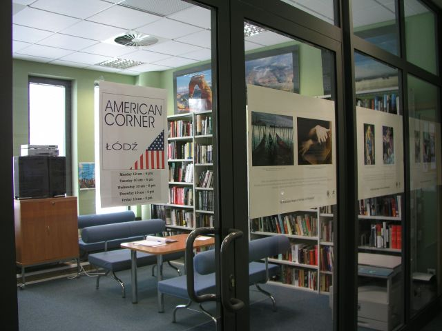 library